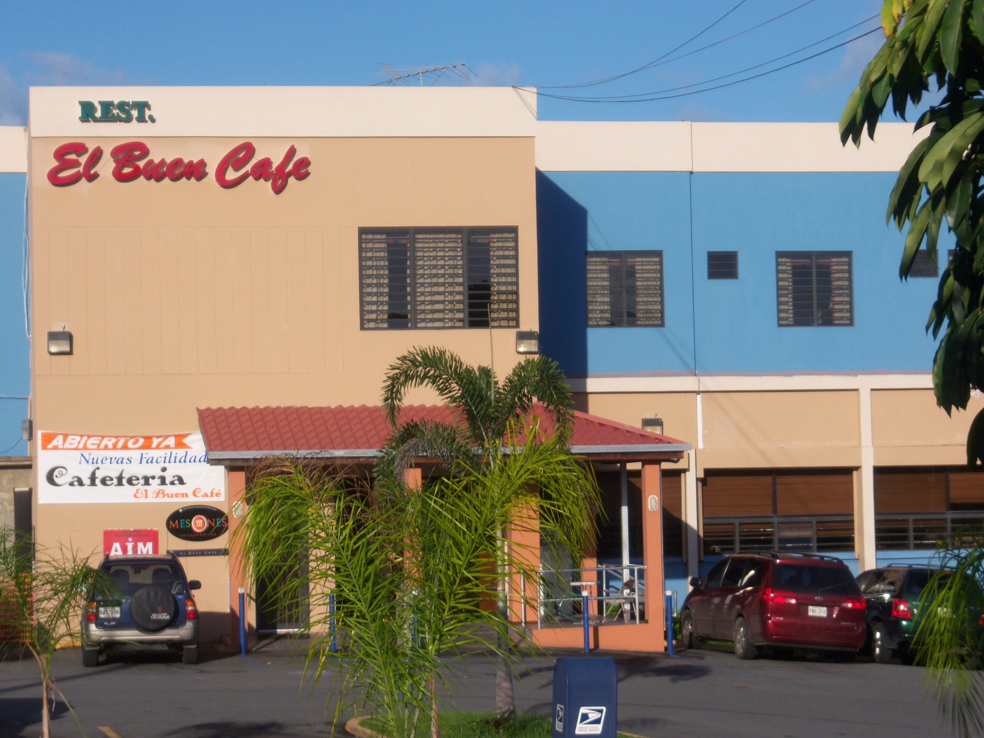 Parador El Buen Café, Hatillo, Puerto Rico